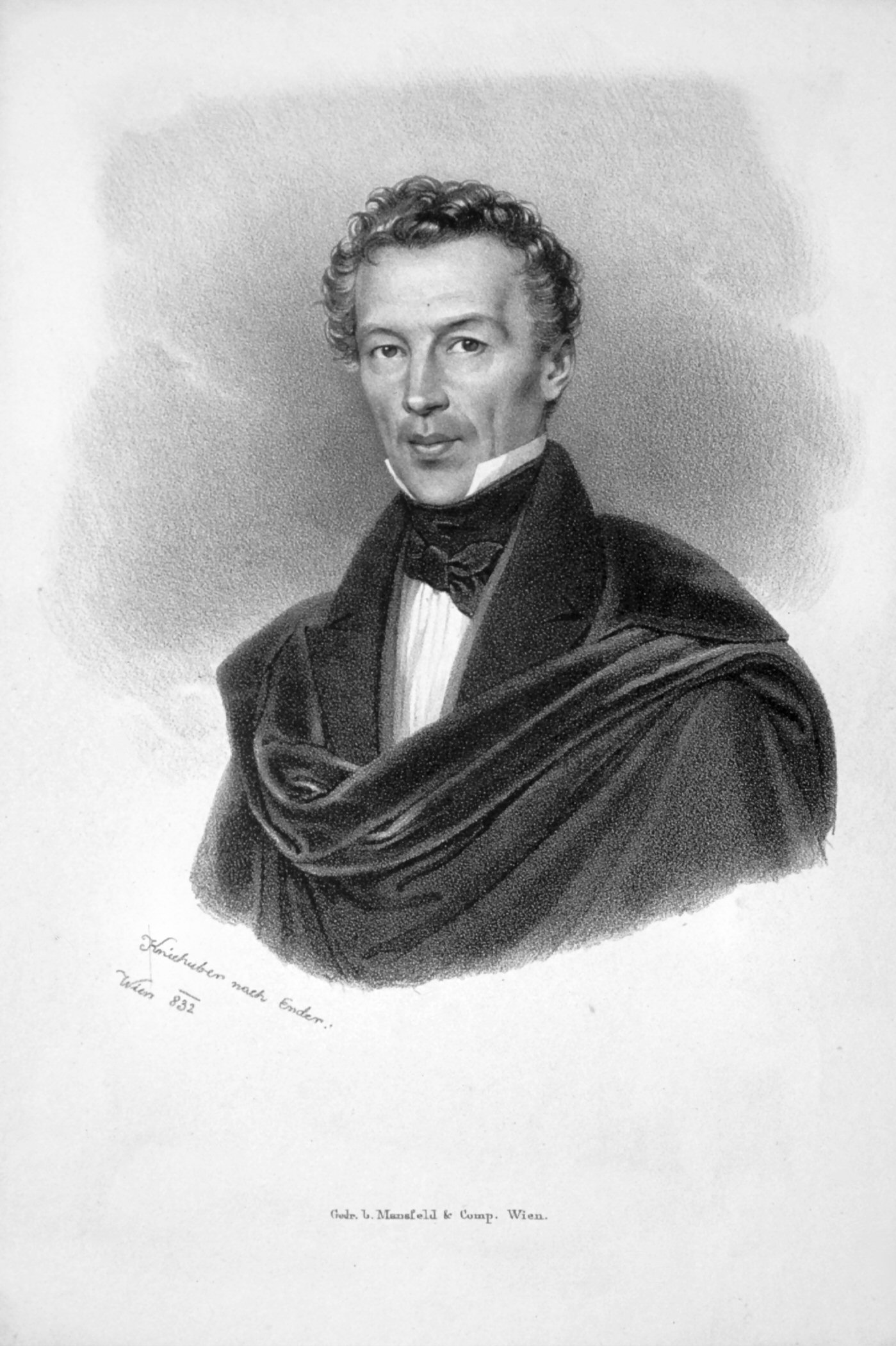 Franz Krieg von Hochfelden (1776-1856) Freiherr, österreichischer Staatsmann.